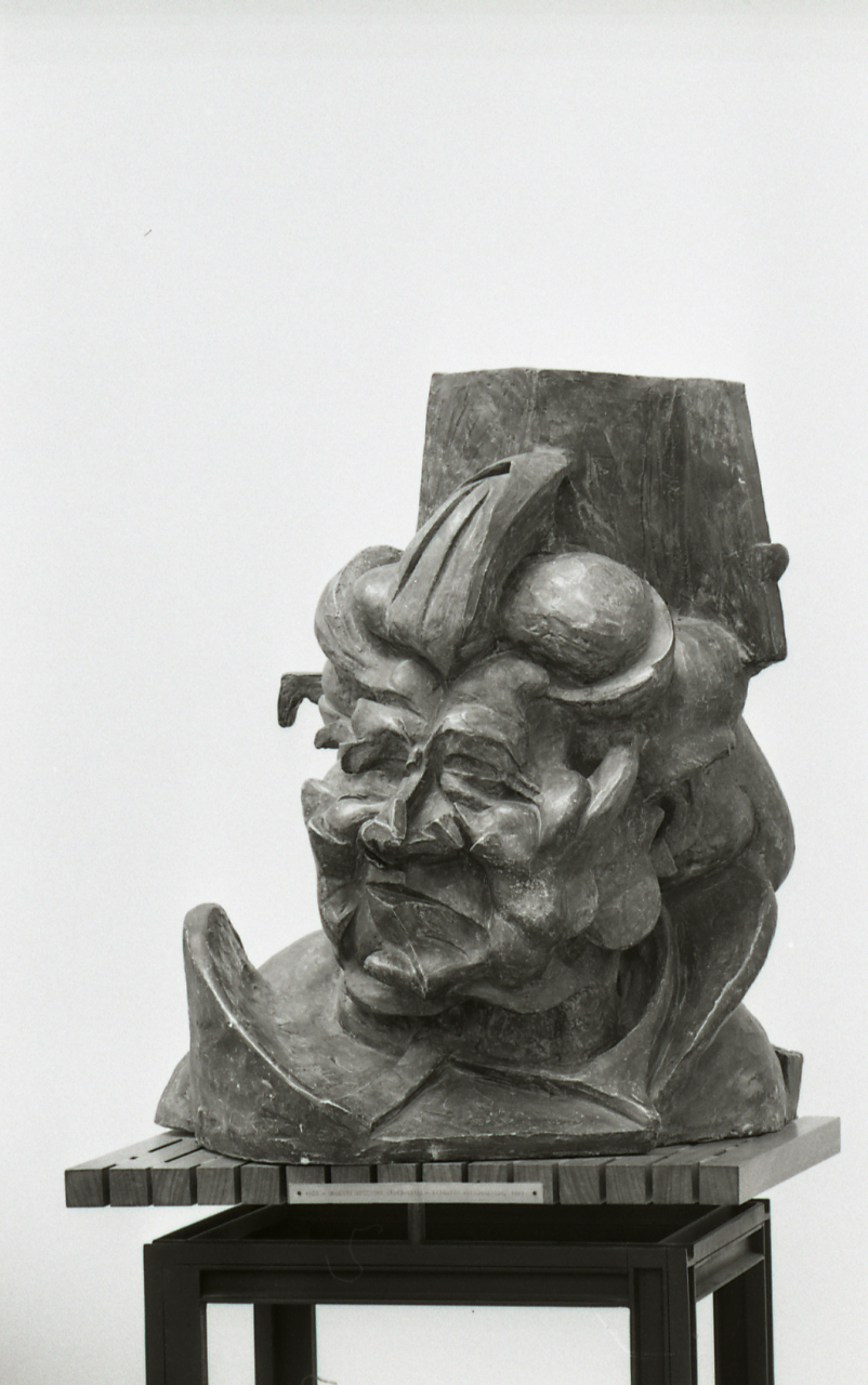 Umberto Boccioni, Antiograzioso (1912-1913), Roma. Galleria Nazionale d'Arte Moderna. Servizio fotografico : Roma, 1978 / Paolo Monti. - Strisce: 7, Fotogrammi complessivi: 36 : Negativo b/n, gelatina bromuro d'argento/ pellicola ; 35 mm. - ((Sul portanegativi: N[I]K[MA]T FP4. - Il fotogramma n. 26 è vuoto. - Occasione: Documentazione per la pubblicazione: "Mostra di Medardo Rosso, 1858-1928", catalogo della mostra, Milano 1979, Milano, Società per le Belle Arti ed Esposizione permanente. - Fonte: Agenda di Paolo Monti: Nikon Leika 3001-/ Monti 1978 (1978-1982), presso Archivio Paolo Monti. - Fonte: Fattura di Paolo Monti: IV. Commesse/ Fattura n. 15/ Fotografie per catalogo mostra sculture Medardo Rosso (1978/11/16), presso Archivio Paolo Monti. - Fonte: Monografia: Mostra di Medardo Rosso, 1858-1928: Palazzo della Permanente, Milano, gennaio-marzo 1979, catalogo della mostra, Milano 1979, testi di Luciano Caramel et al., Milano, Società per le Belle Arti ed Esposizione permanente (1979)